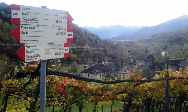 Indicazioni con i sentieri che attraversano Oira e Canova.